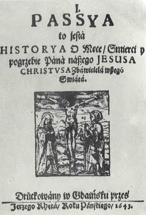 Титульная страница перевода Страстей Христовых (Pasja), изданных в одной книге с переводом лютеранского катехизиса (Mały Catechism D. Marciná Lutherá…, w Gdaińsku) в 1643 году (автор перевода — Михал Понтанус)